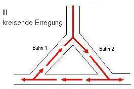 Schemazeichnung einer kreisenden Erregung am Herzen. Vorlage aus EKG-Kurs für Isabel Hans-Peter Schuster/Hans-Joachim Trappe